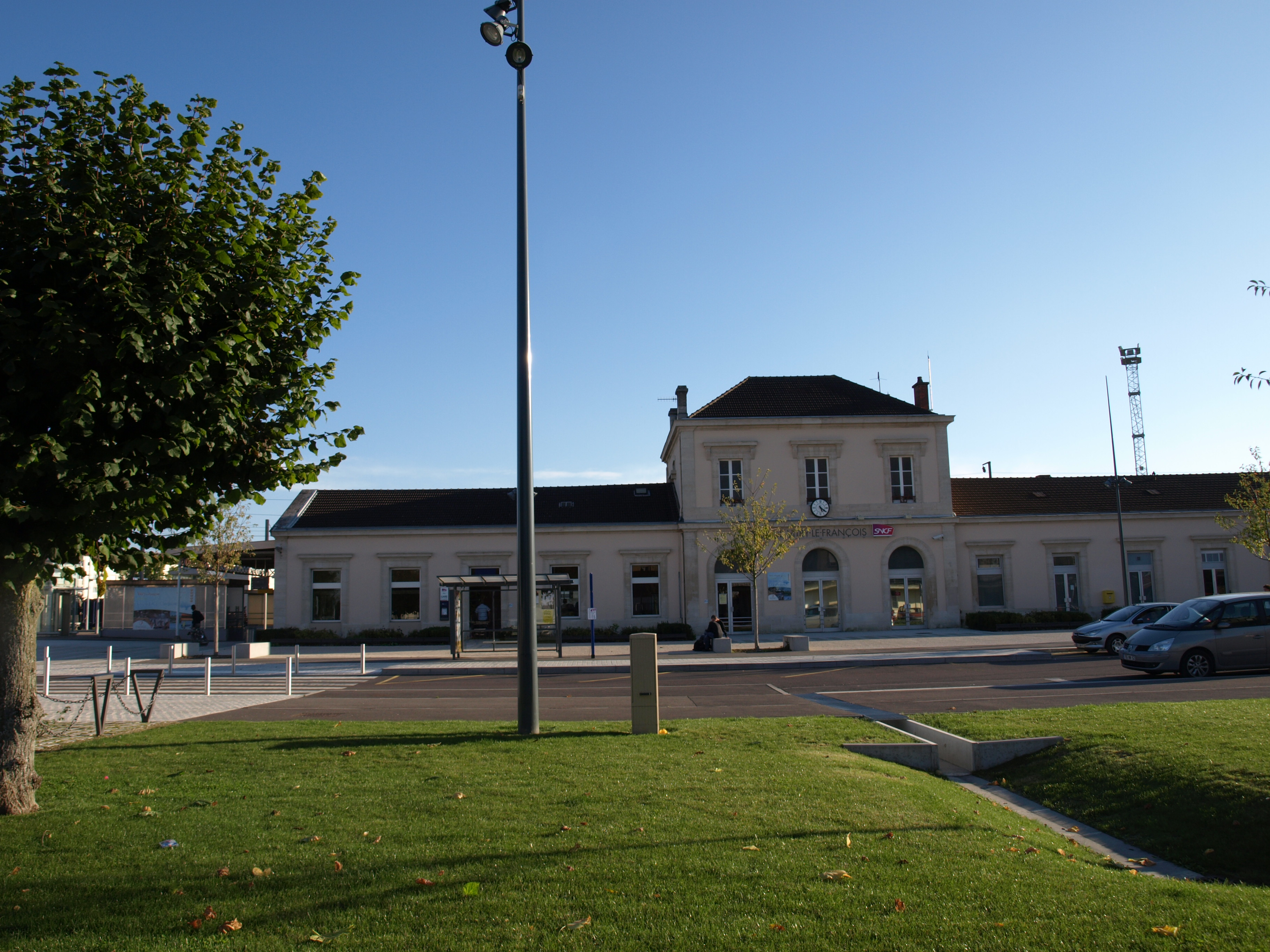 Vitry-le-François (51300 - FRANCE) : photographies Gare ferroviaire.